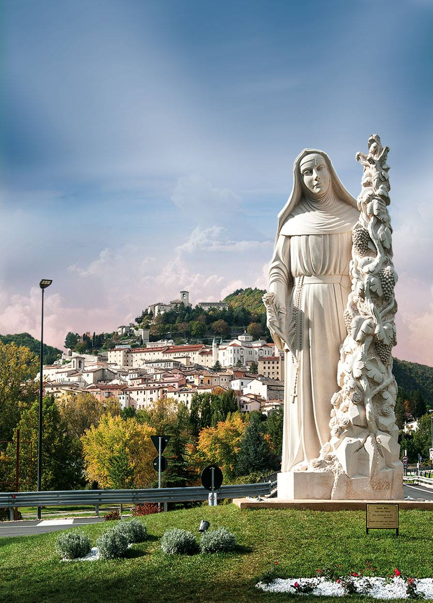 Panorama su Cascia e la grande statua di Santa Rita, donata da un mecenate libanese a nome della devozione del Libano ed installata al centro di una nuova rotatoria, alle porte della città.